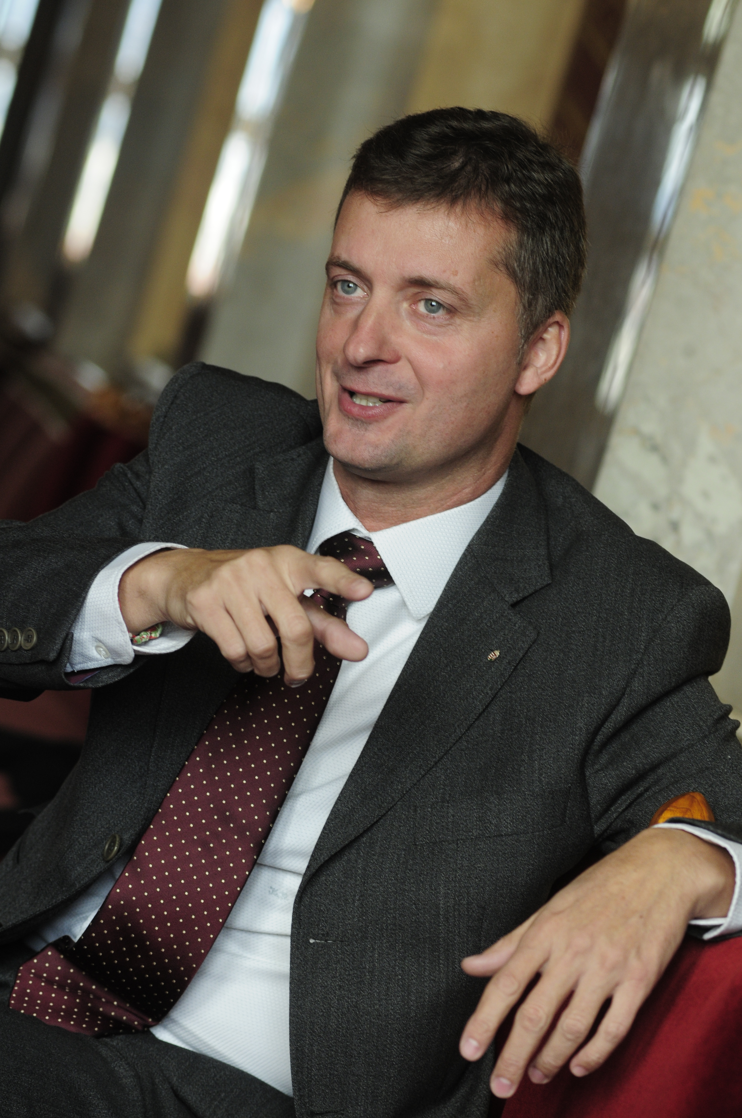 Kubatov Gábor magyar politikus, a Fidesz – Magyar Polgári Szövetség országos pártigazgatója, országgyűlési képviselő. A Ferencvárosi Torna Club elnöke.